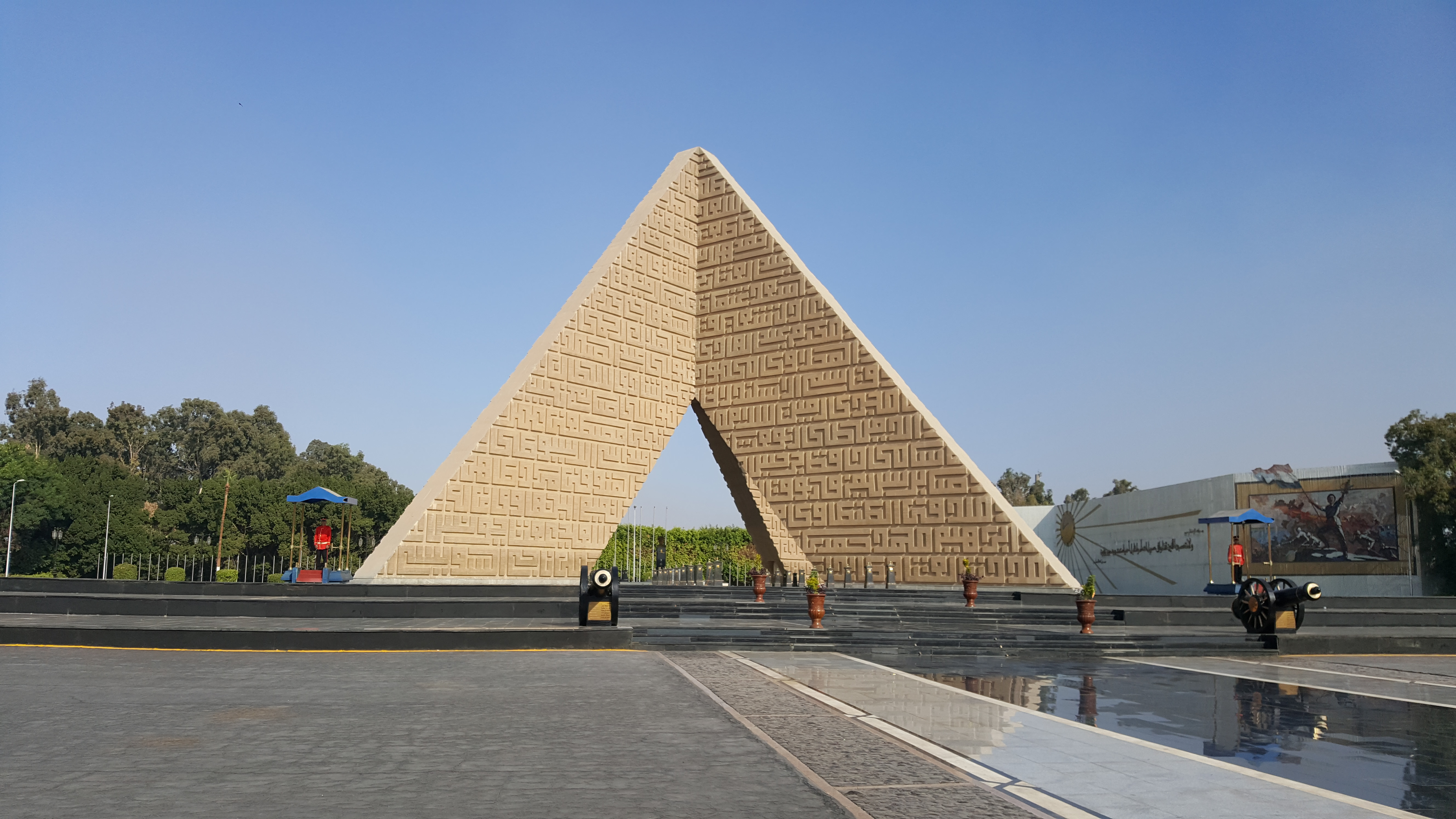 Tomb of Unknown Soldier in Cairo